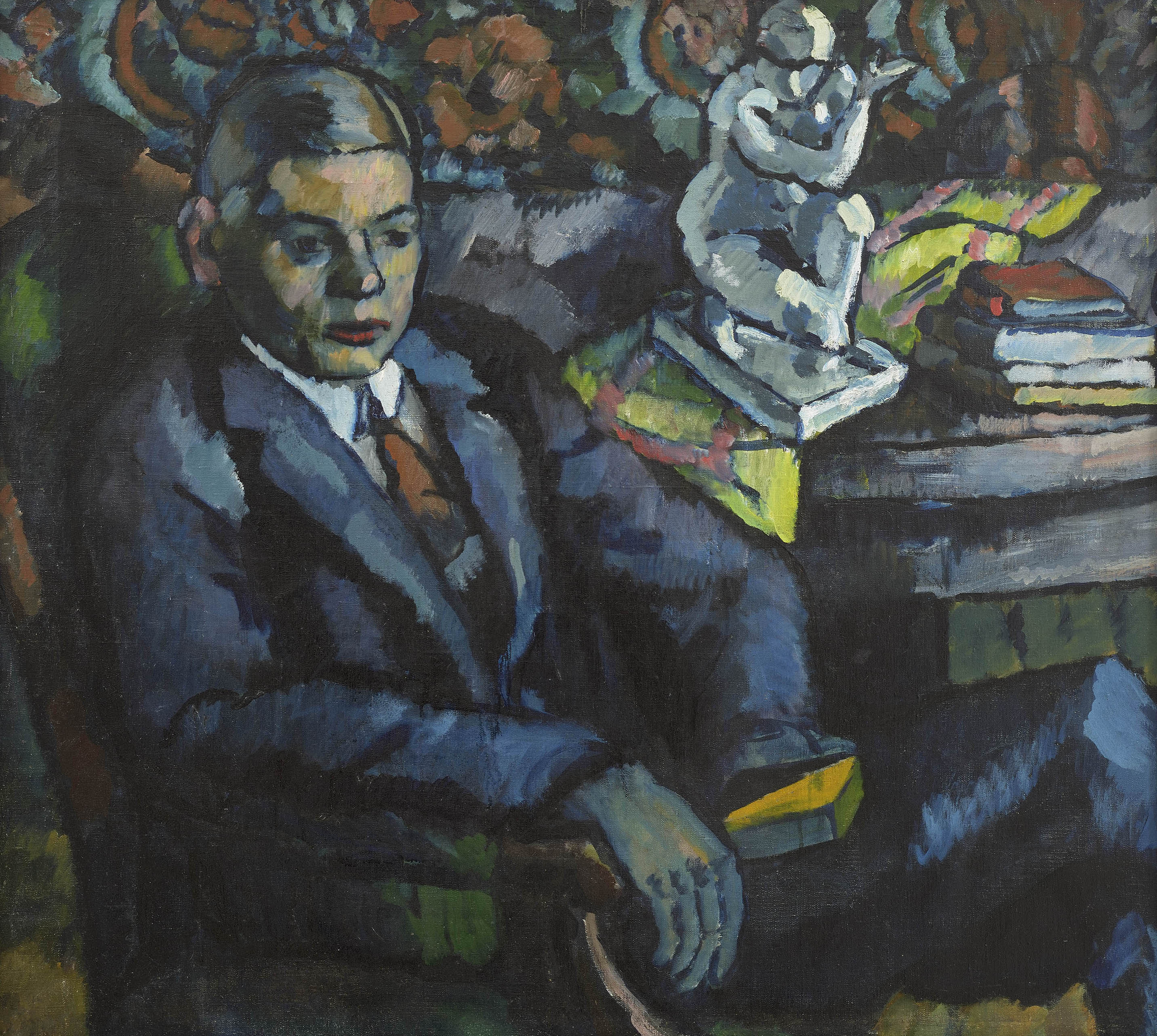 Villem Ormisson "Mehe portree. Karl Ormisson" (1924-1926); õli, lõuend; 83x92 cm.